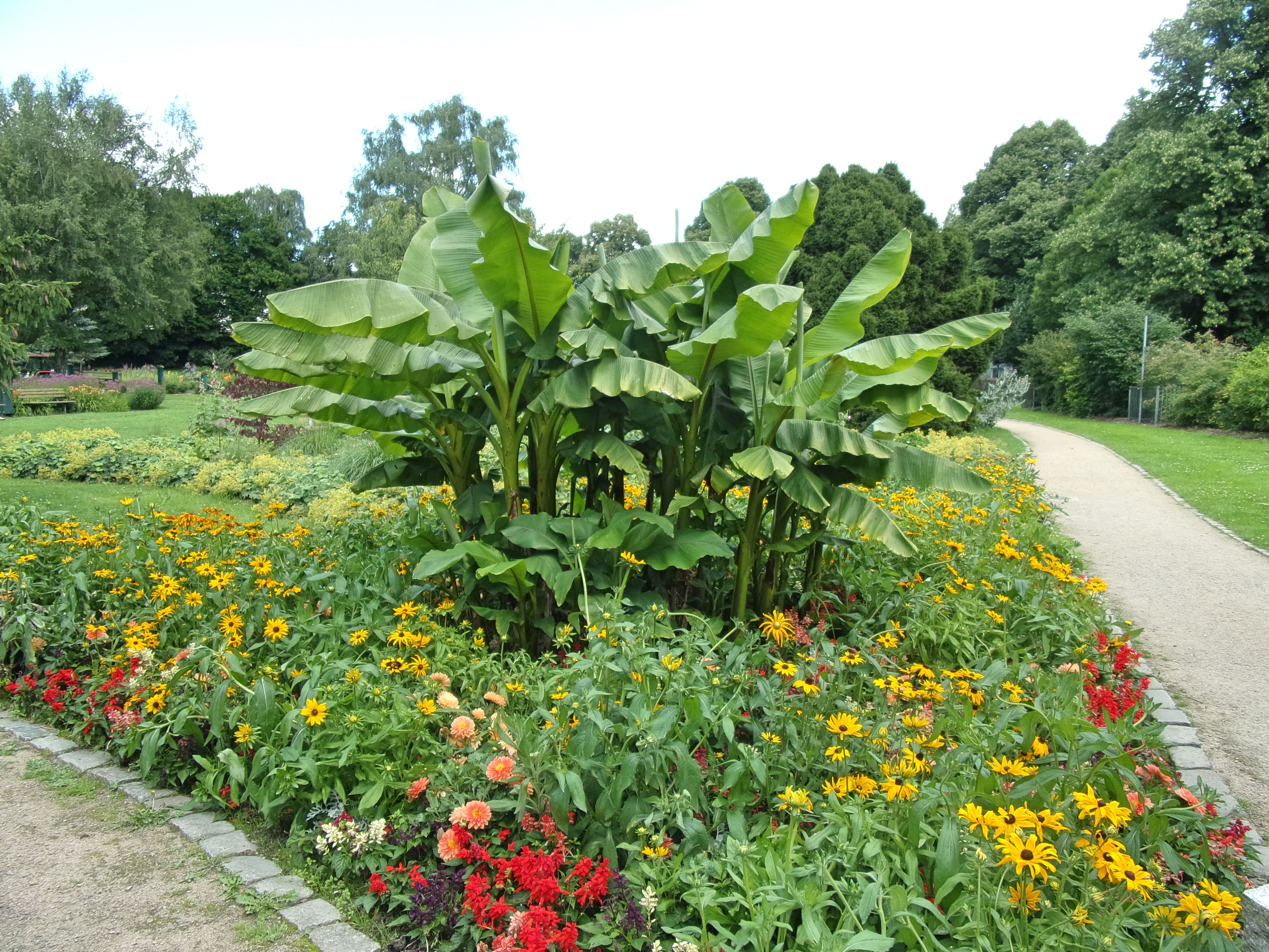 Winterharte Banane in einem Blumenbeet im Botanischen Sondergarten in Wandsbek. Beschilderung: Musa basjoo.